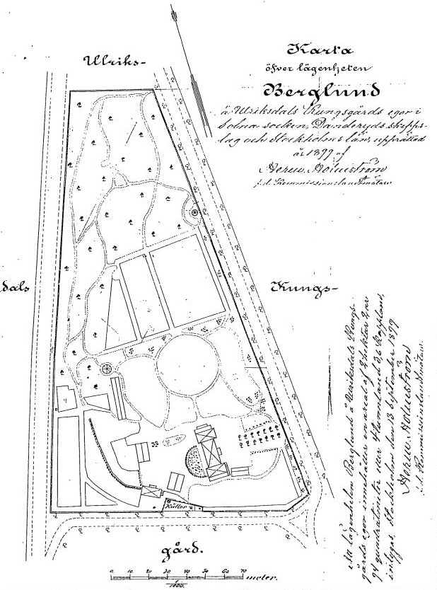 Karta öfver lägenheten Berglund